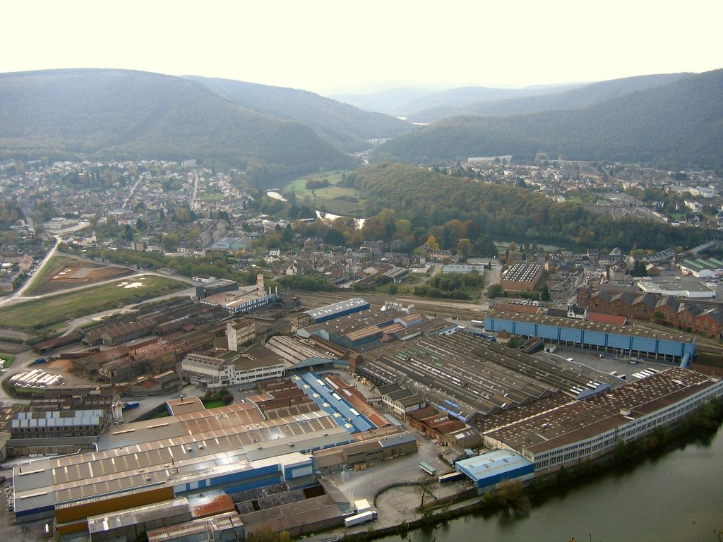 quartier de la Bouverie à Revin (08)